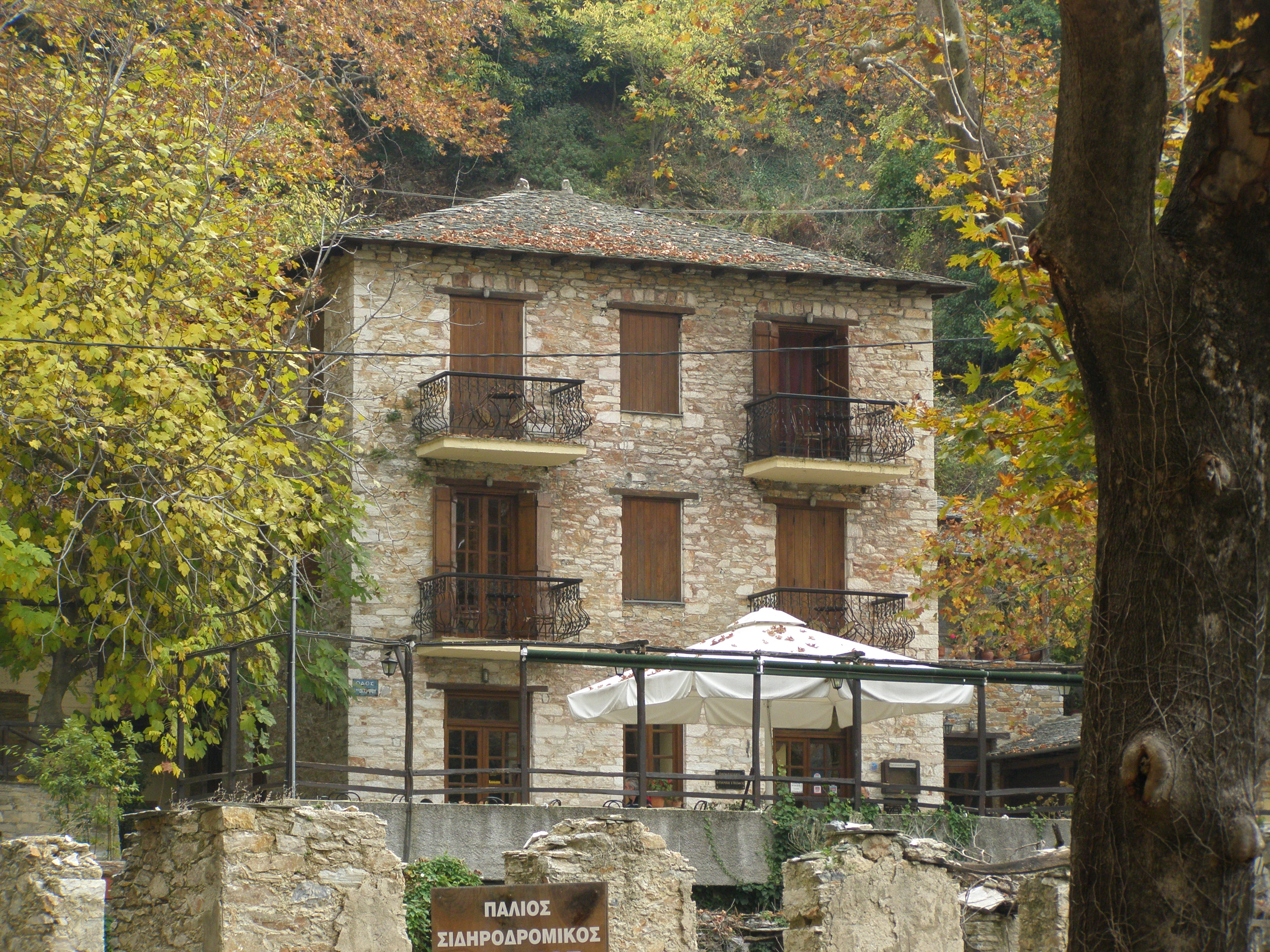 Κτίριο στον σταθμό τρένου στην Μηλιές. Σήμερα είναι ξενοδοχείο.